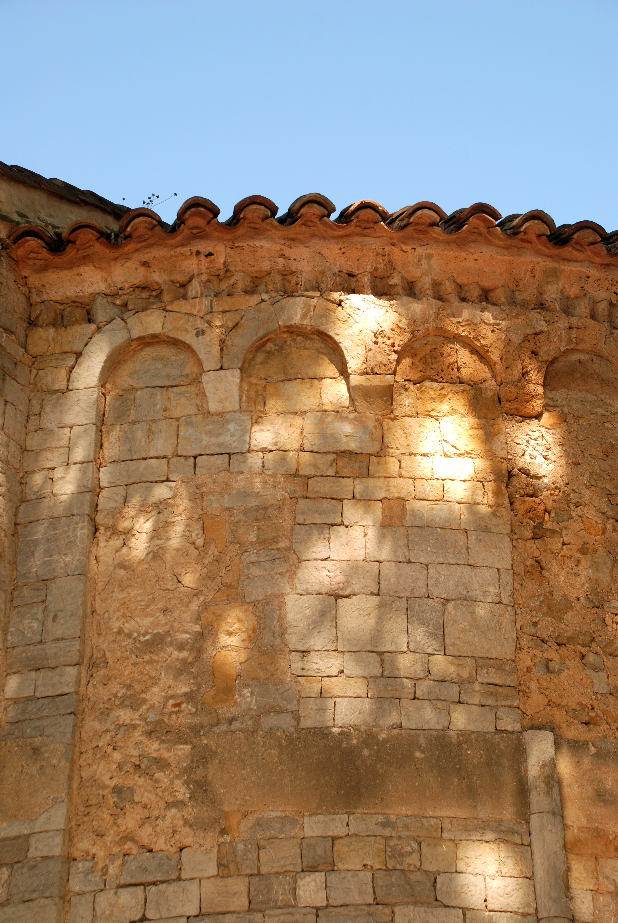 France - Hérault - Église de Saint-Jean-de-Buèges